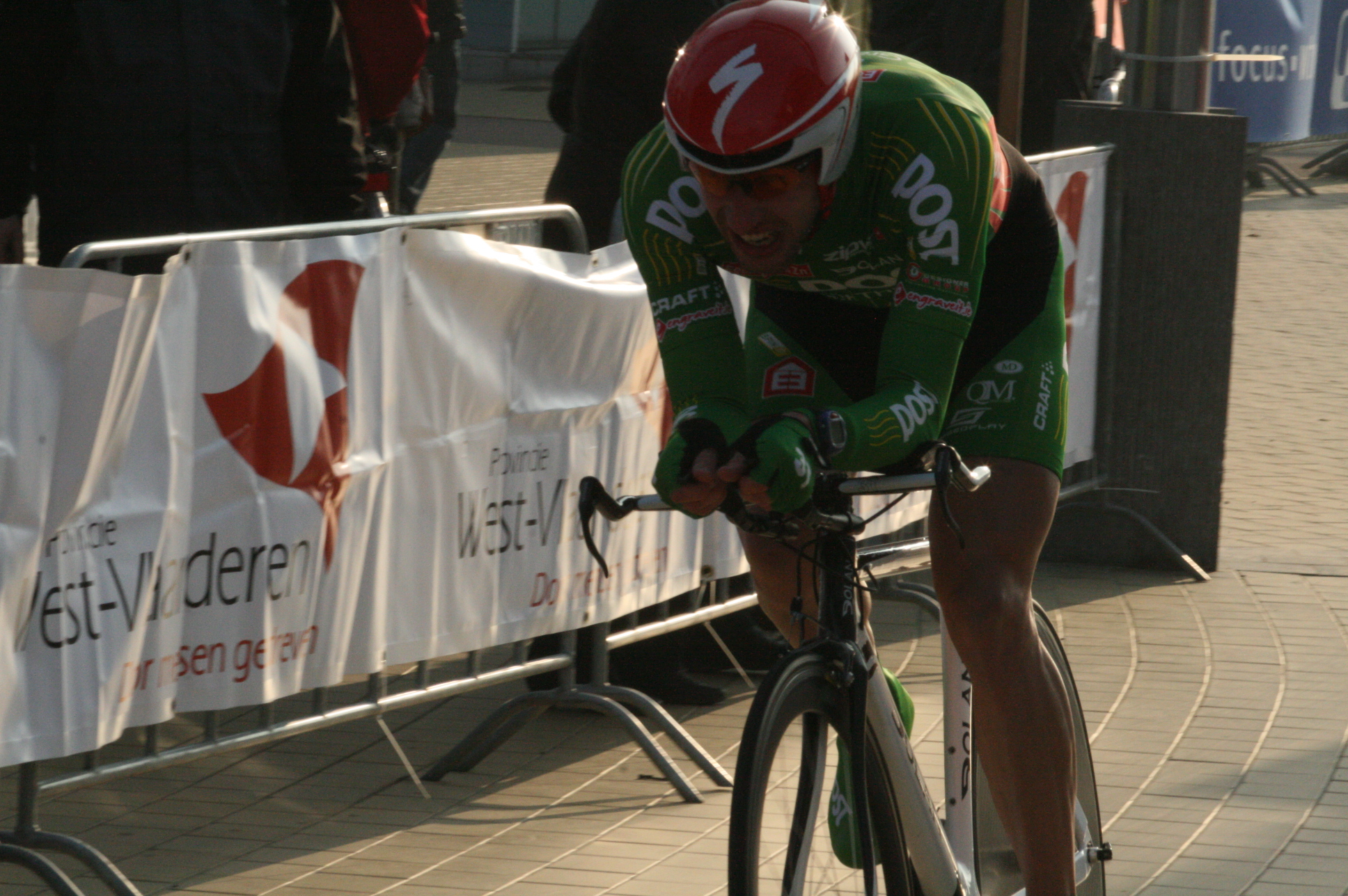 Driedaagse van West-Vlaanderen 2011, proloog in Middelkerke